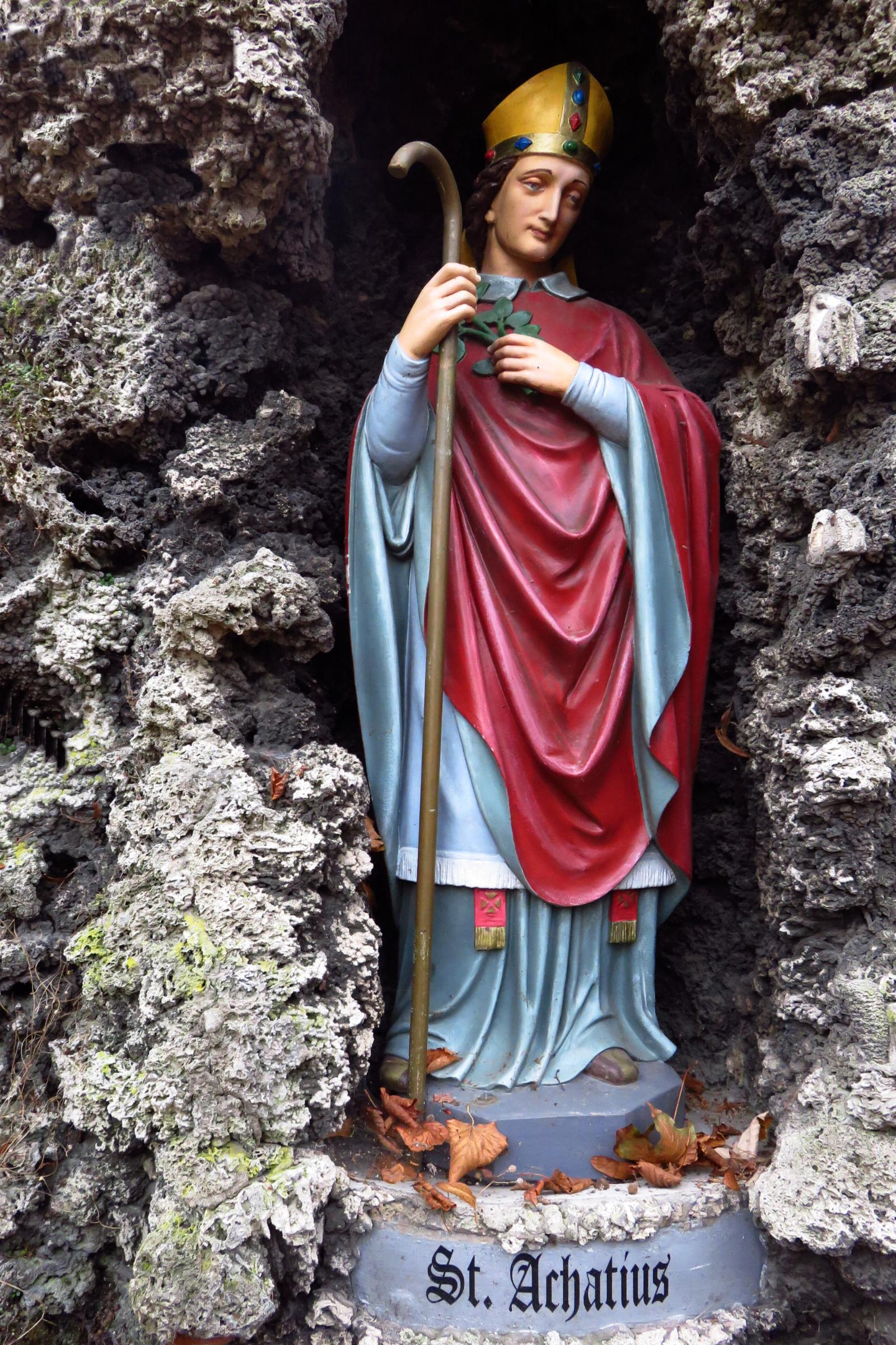 Christliche Figuren in Mönchengladbach / Grottenanlage in Hehn Heiligenpesch